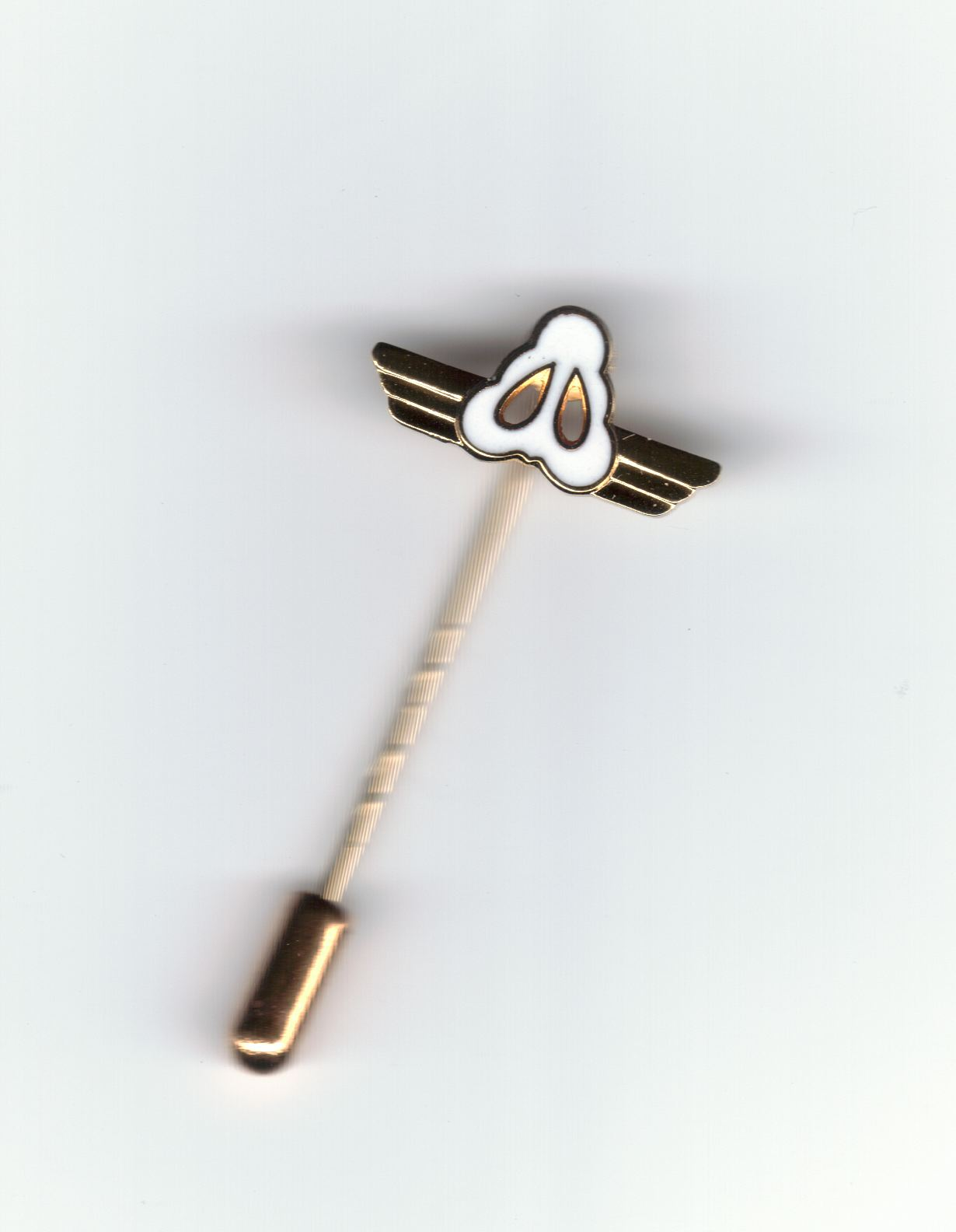 Kavajnål med bevingade näsvingar i vit emalj